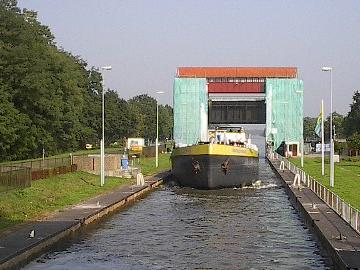 Sluis Twentekanaal (hoog), eigen foto